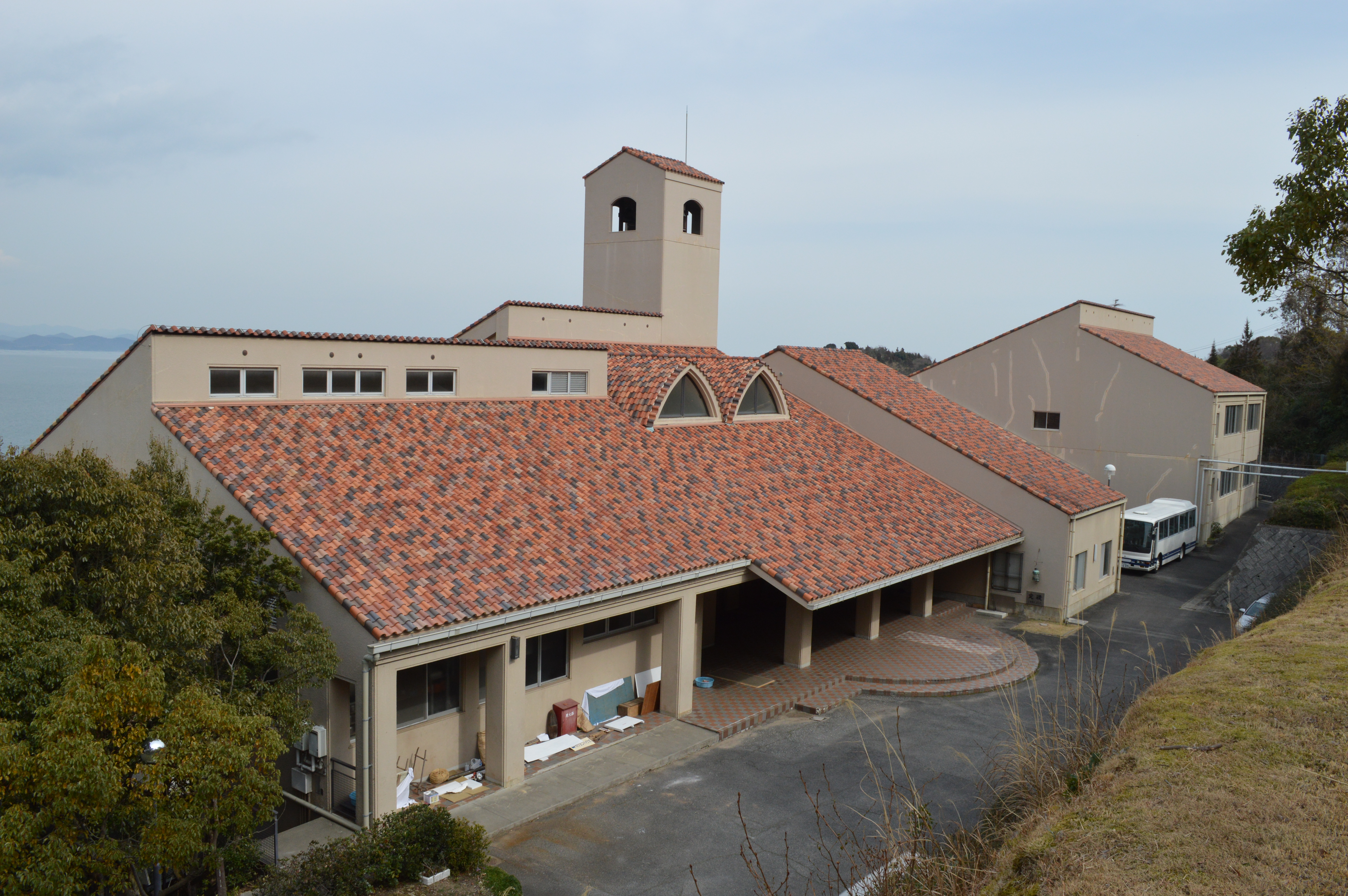 岡山県瀬戸内市牛窓町の前島にあるカリヨンハウス（研修施設）。